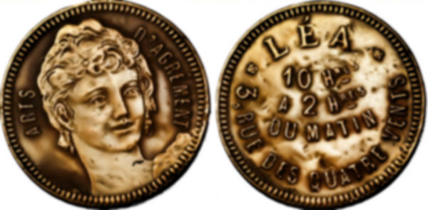 Jeton Léa ART D'AGREMENT Maison close : 3 rue des Quatre-Vents, Paris, France